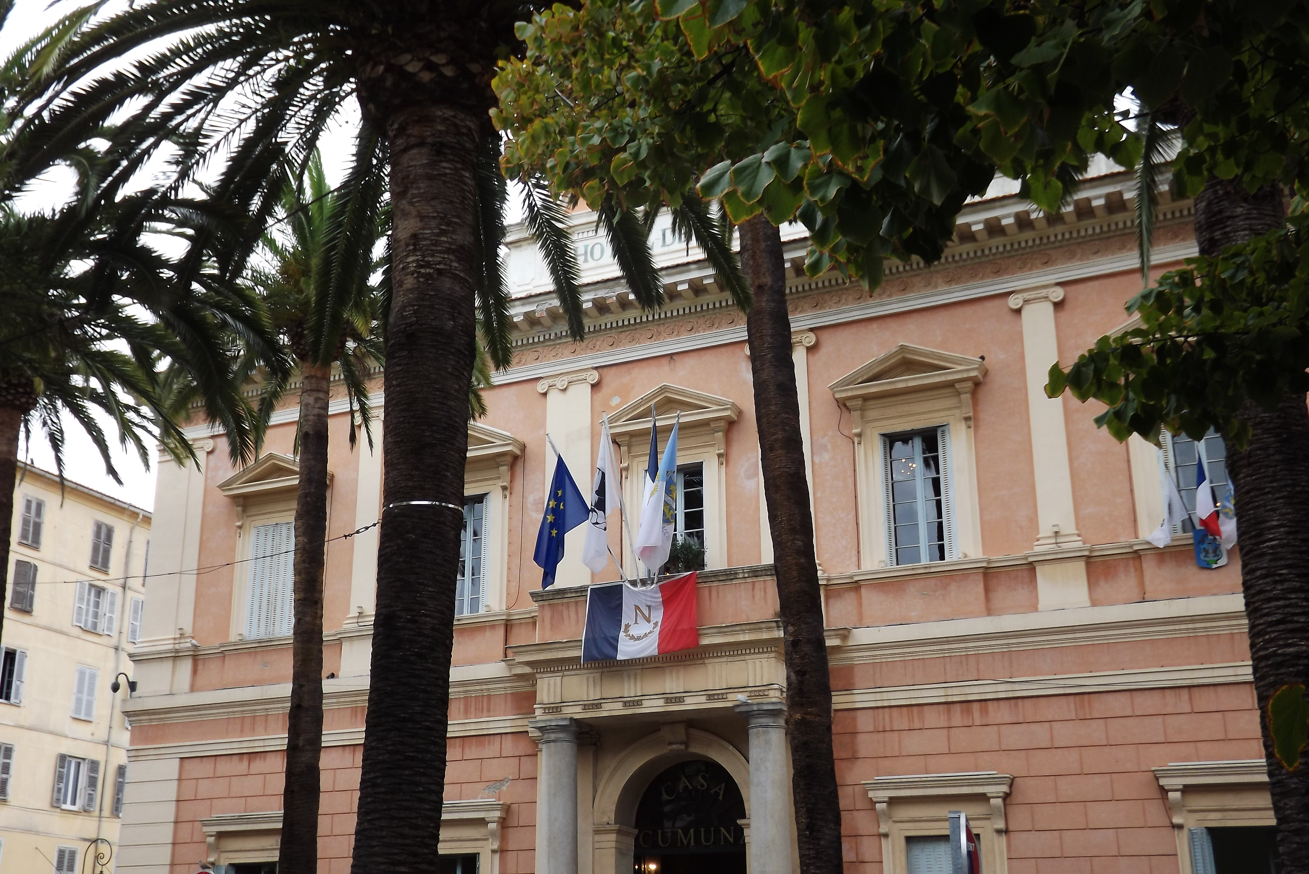 Corsica 2012